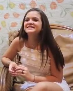 Mel Maia durante entrevista.